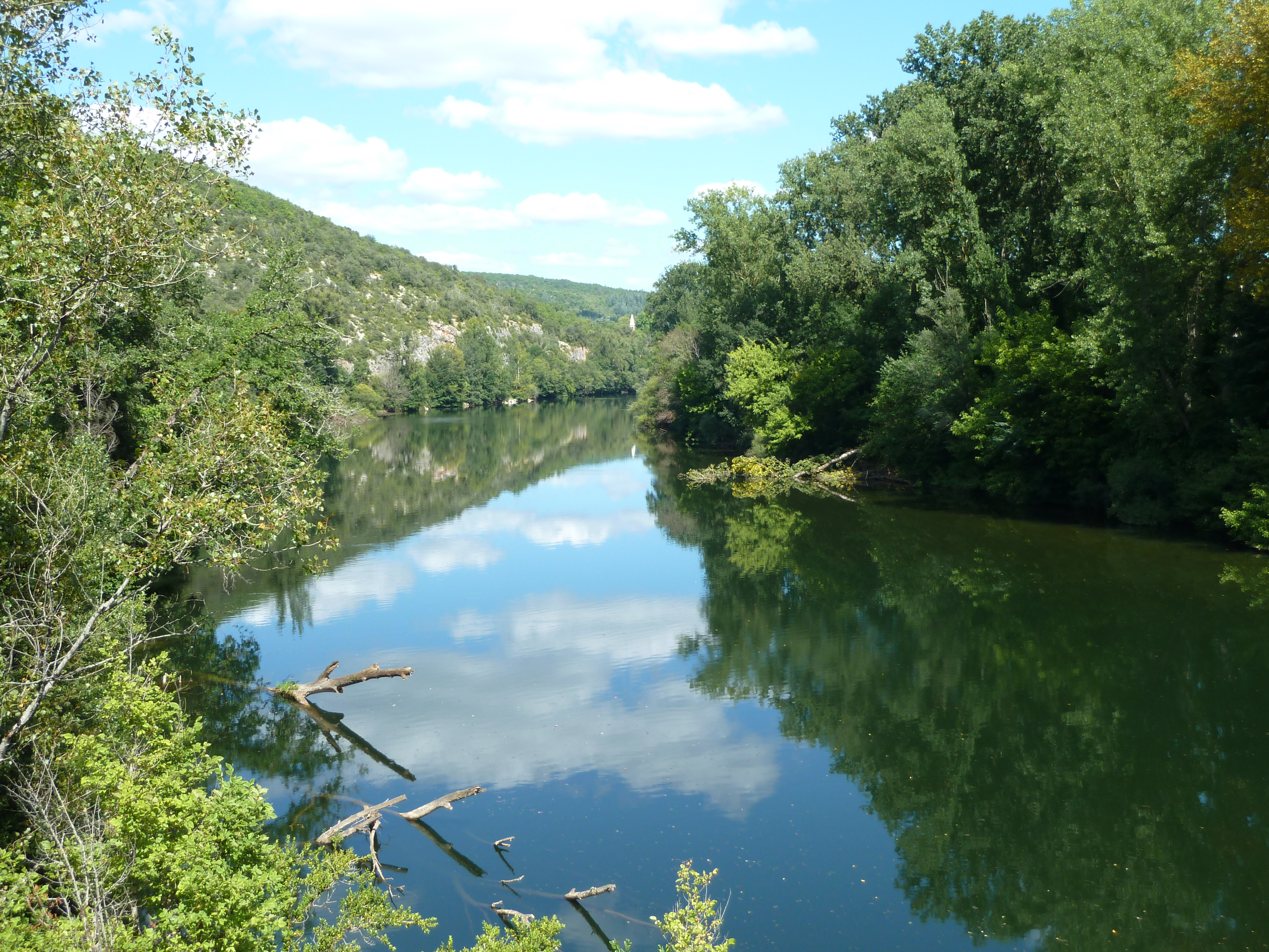 Lot à l'ouest de Saint-Cirq